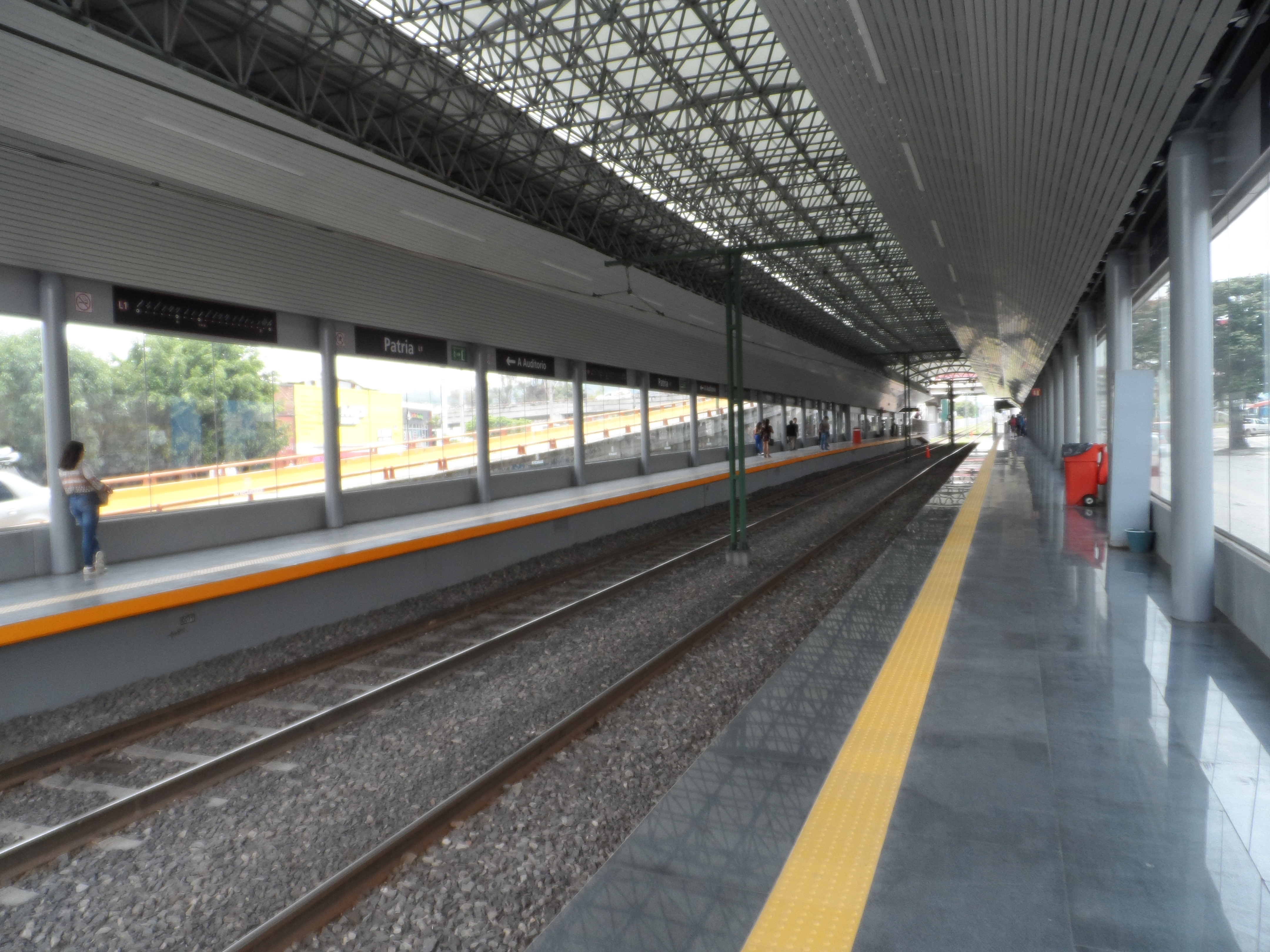 Andenes de la estación "Patria" de la Línea 1 del Tren Ligero de Guadalajara.